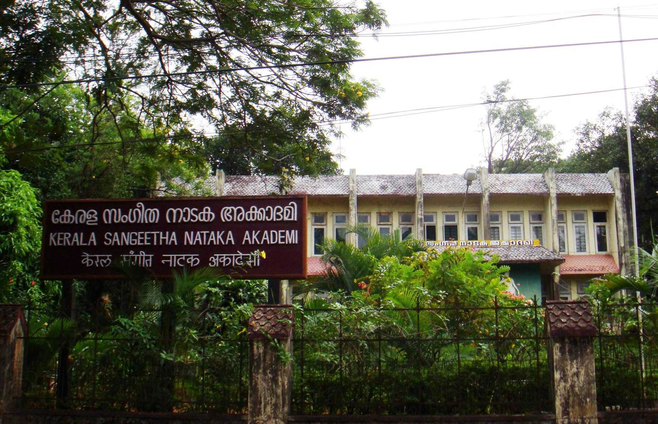 Kerala Sangeetha Nadaka Academy, Thrissur